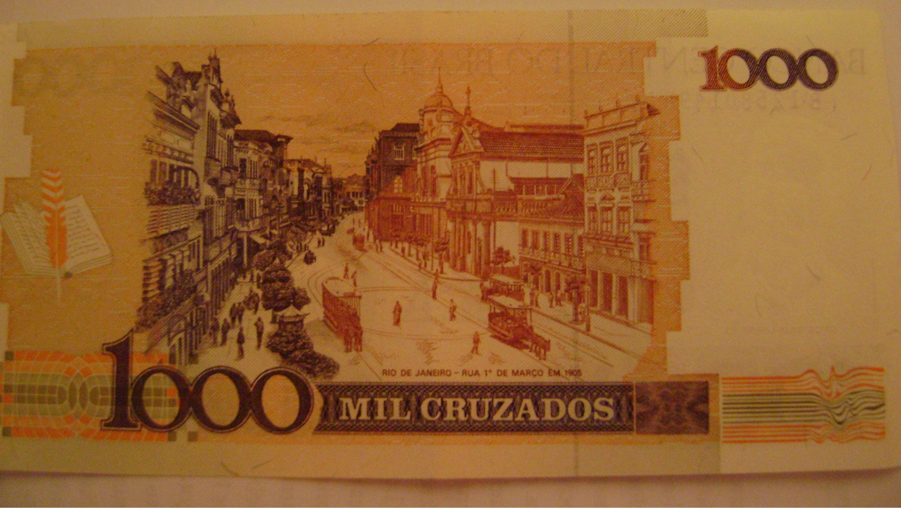 Billete brasileño en el que aparece una calle de Rio de Janeiro a comienzos del siglo XX.